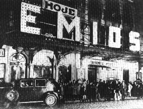 Antigo Cine República (na praça República) na cidade de São Paulo no final da década de 1920